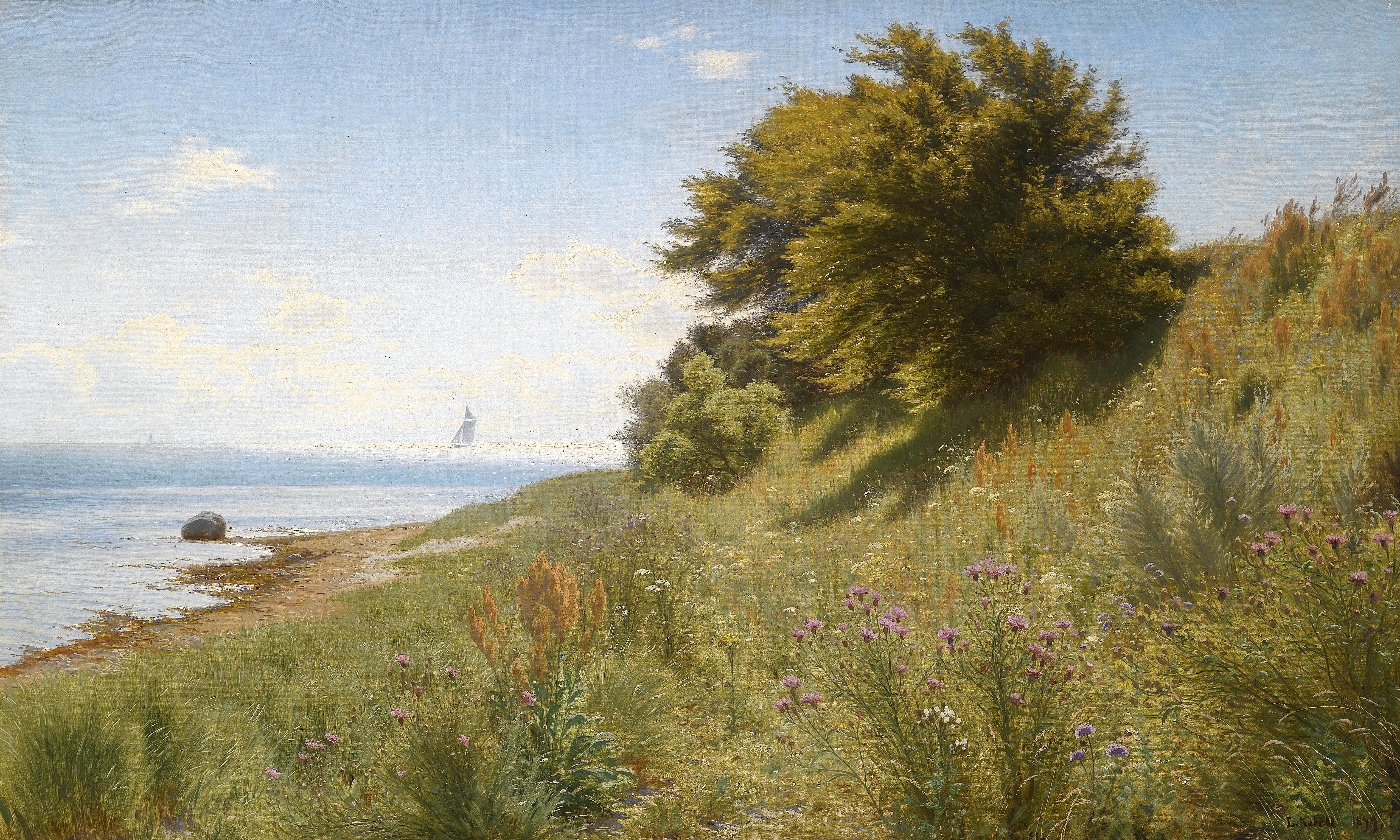 Sommertag am Meer, signiert und datiert L. Kabell, Öl auf Leinwand, 74,5 x 121,5 cm